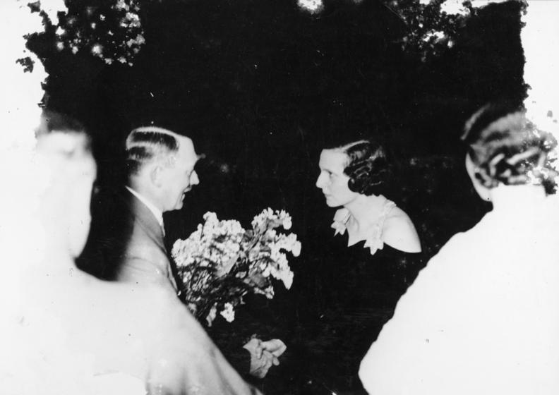 Adolf Hitler und Leni Riefenstahl 1934 Adolf Hitler begrüßt Leni Riefenstahl. Zentralbild Abgebildete Personen: Hitler, Adolf: Reichskanzler, Deutschland Riefenstahl, Leni: Filmproduzentin, Regisseurin, Schauspielerin, Fliegerin, Bundesrepublik Deutschland (GND 118600761)